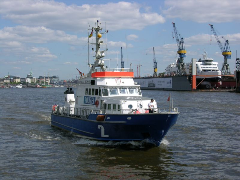 Polizeiboot (FPB 29) BÜRGERMEISTER WEICHMANN, Baunummer: 1430, Ablieferung: 1992, der Strom- und Hafenbau Hamburg/Landespolizeiverwaltung.